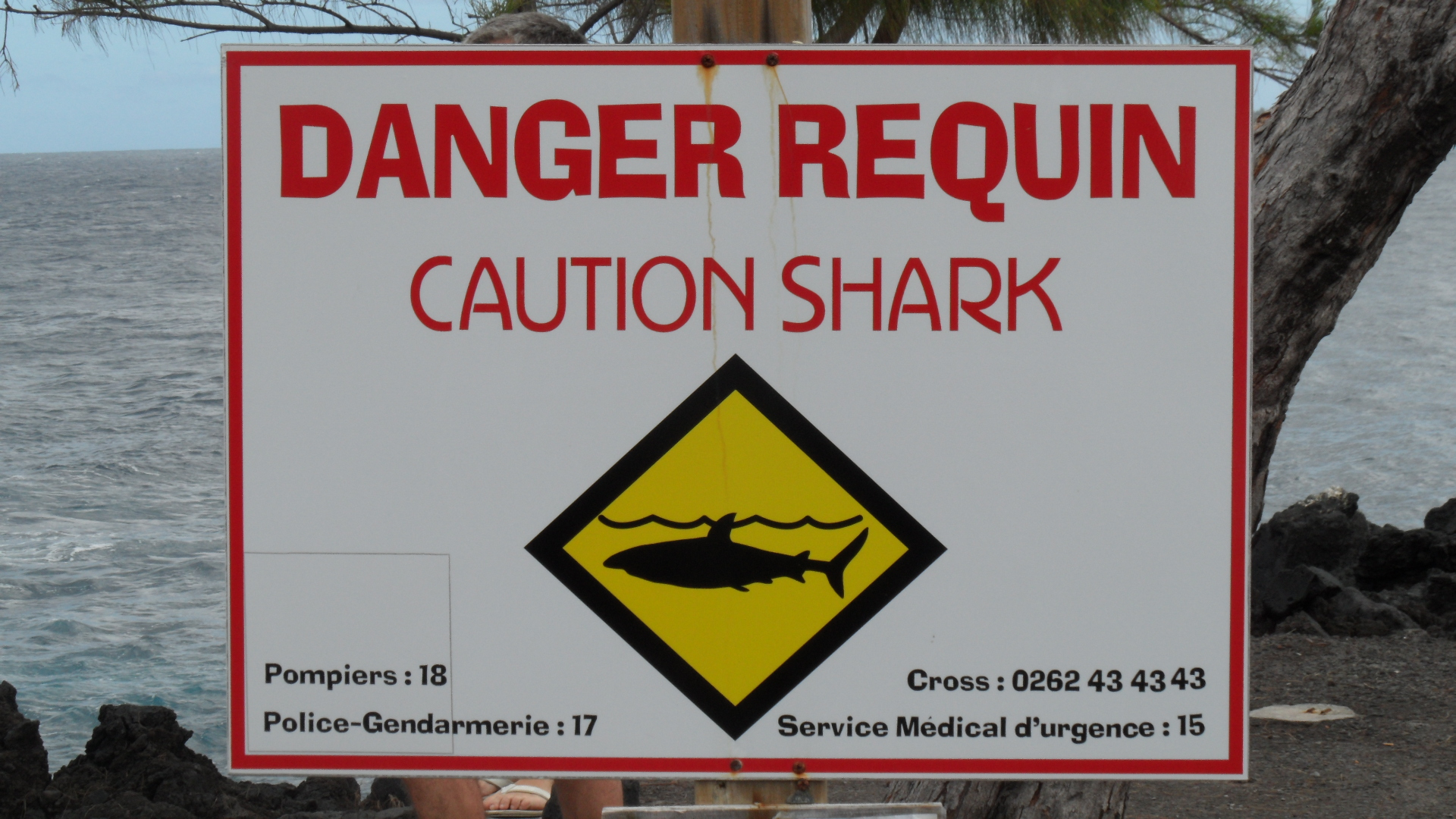 Panneau de danger requin à la Réunion en août 2014